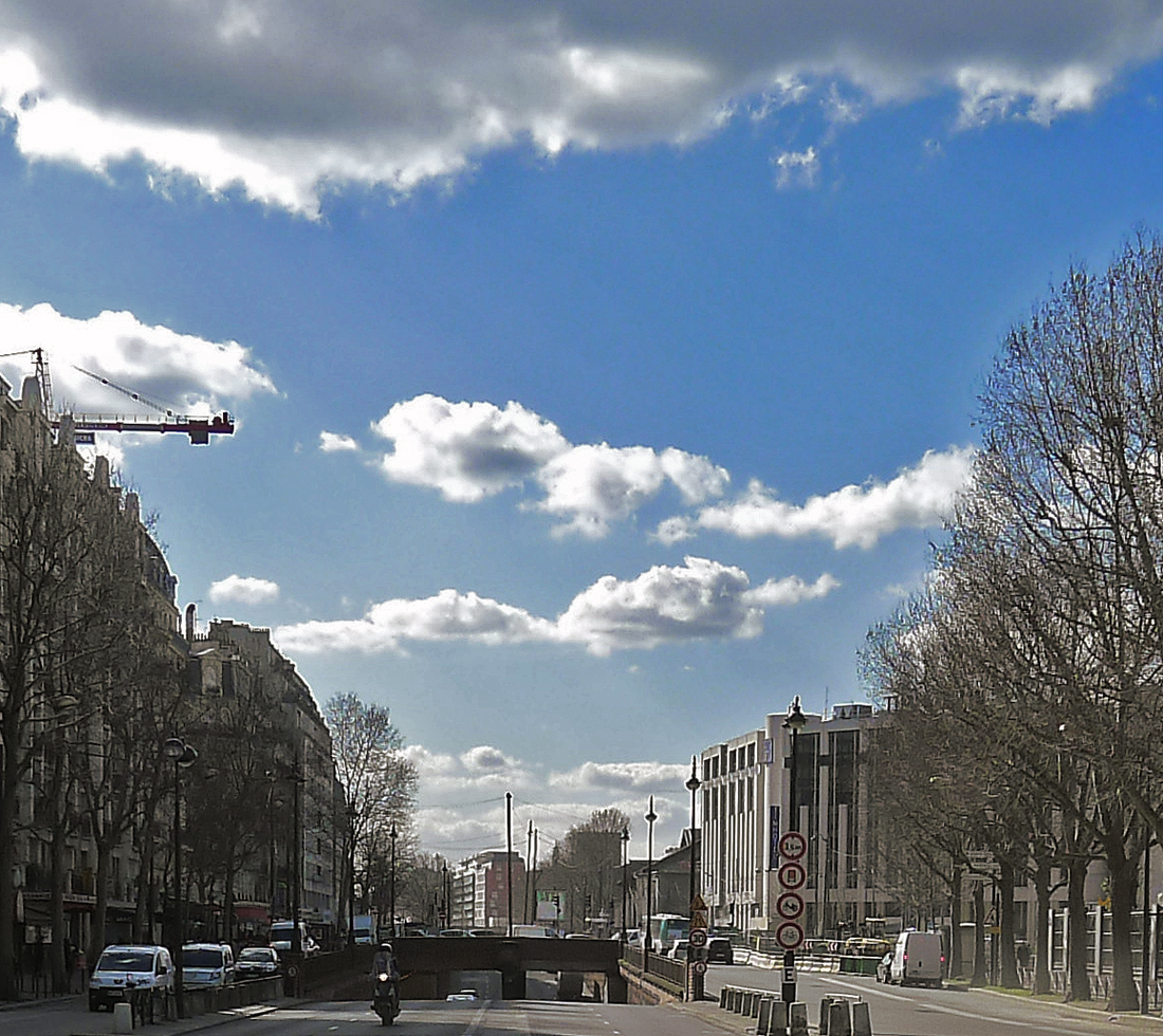 Porte de Clichy (vue depuis le boulevard Bessières) - Paris XVII